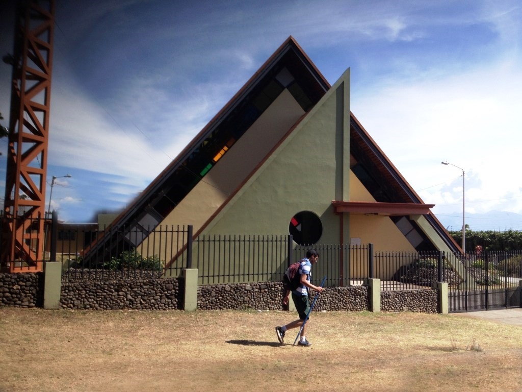 Templo católico de Buena Vista, Barva, Heredia, Costa Rica. Obra del Arq. Ibo Bonilla, diseñado en 1.980, con una arquitectura que mezcla los referentes del templol católico con la construcción de montaña, particular de estas zonas altas cercanas la Volcán Barva.